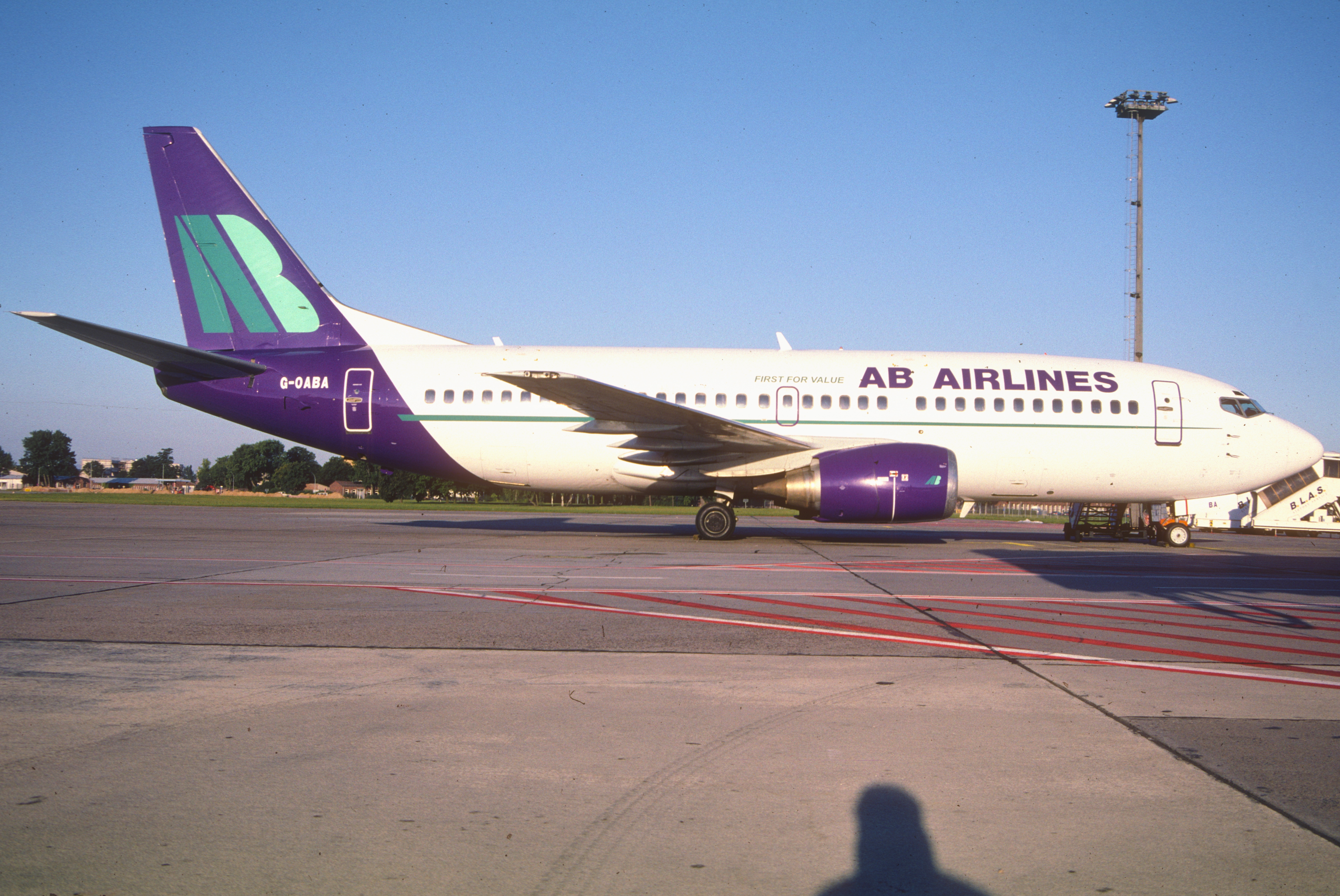 AB Airlines Boeing 737-300; G-OABA @ SXF